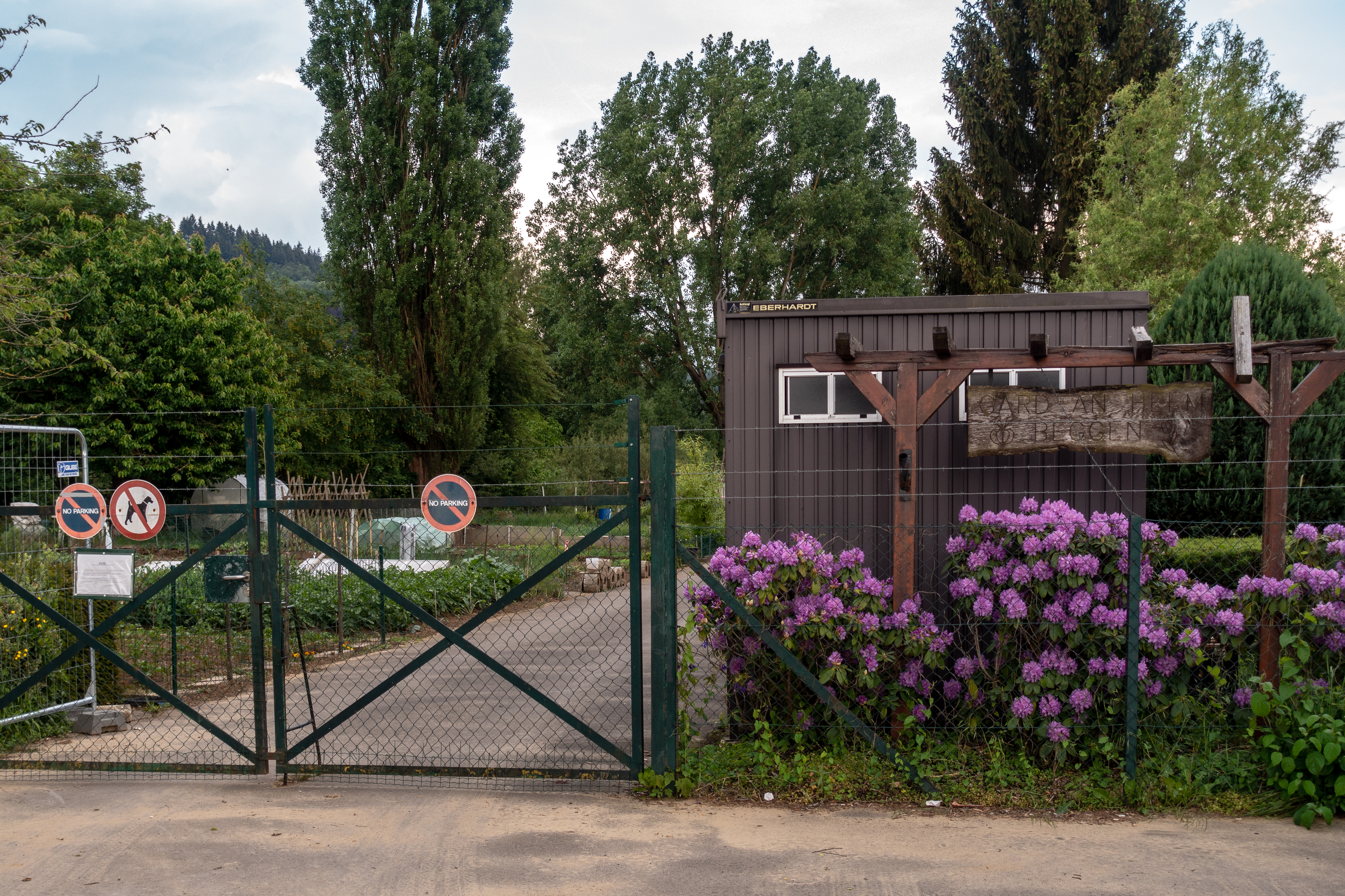 "Gard an Heem Beggen" bei der Uelzecht an der Rue de Bastogne zu Beggen.